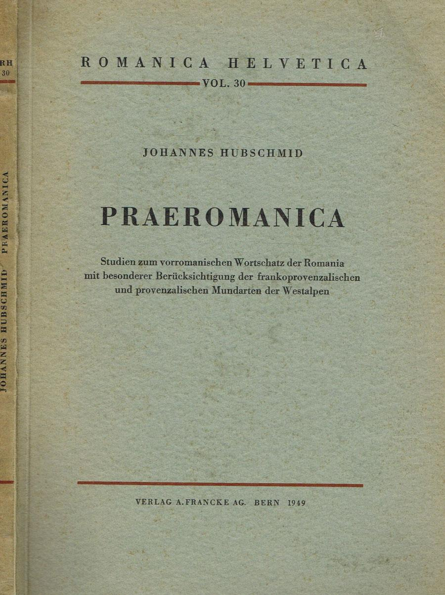 Portada de Praeromanica. Studien zum Vorromanischen Wortschatz der Romania mit besonderer Beriicksichtung der franko provenzalischen und provenzalischen Mundarten der Westalpen. Berna, Verlag A. Francké, 1949. (Romanica Helvetica, vol. 30.)